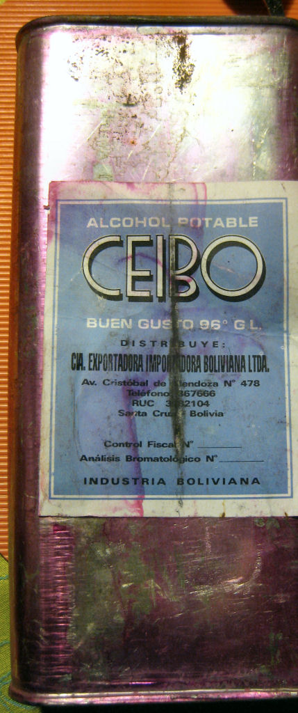 Envase metálico de etanol (alcohol etílico) 96 grados.